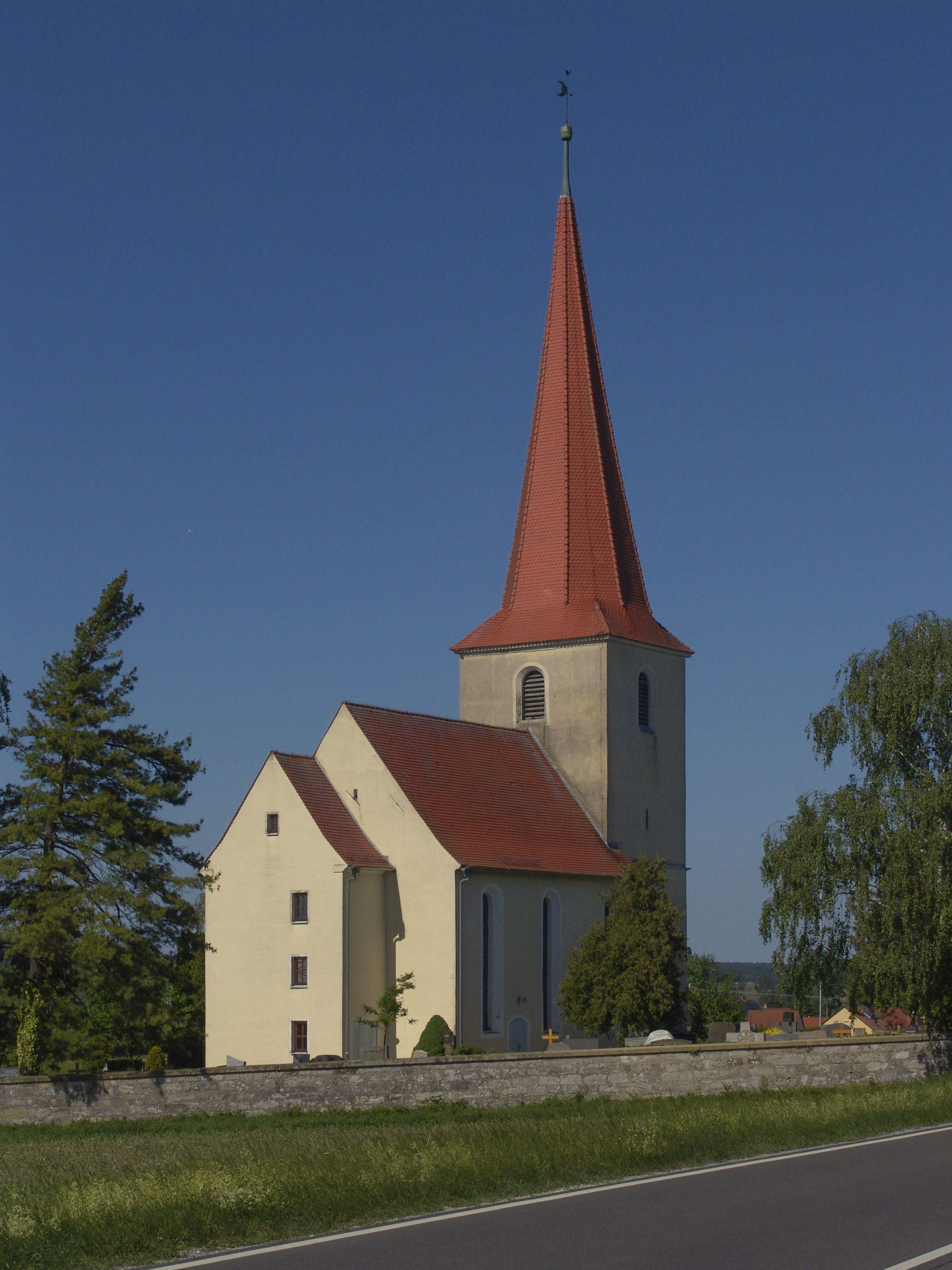 evang.-luth. Kirche St. Markus in Dottenheim